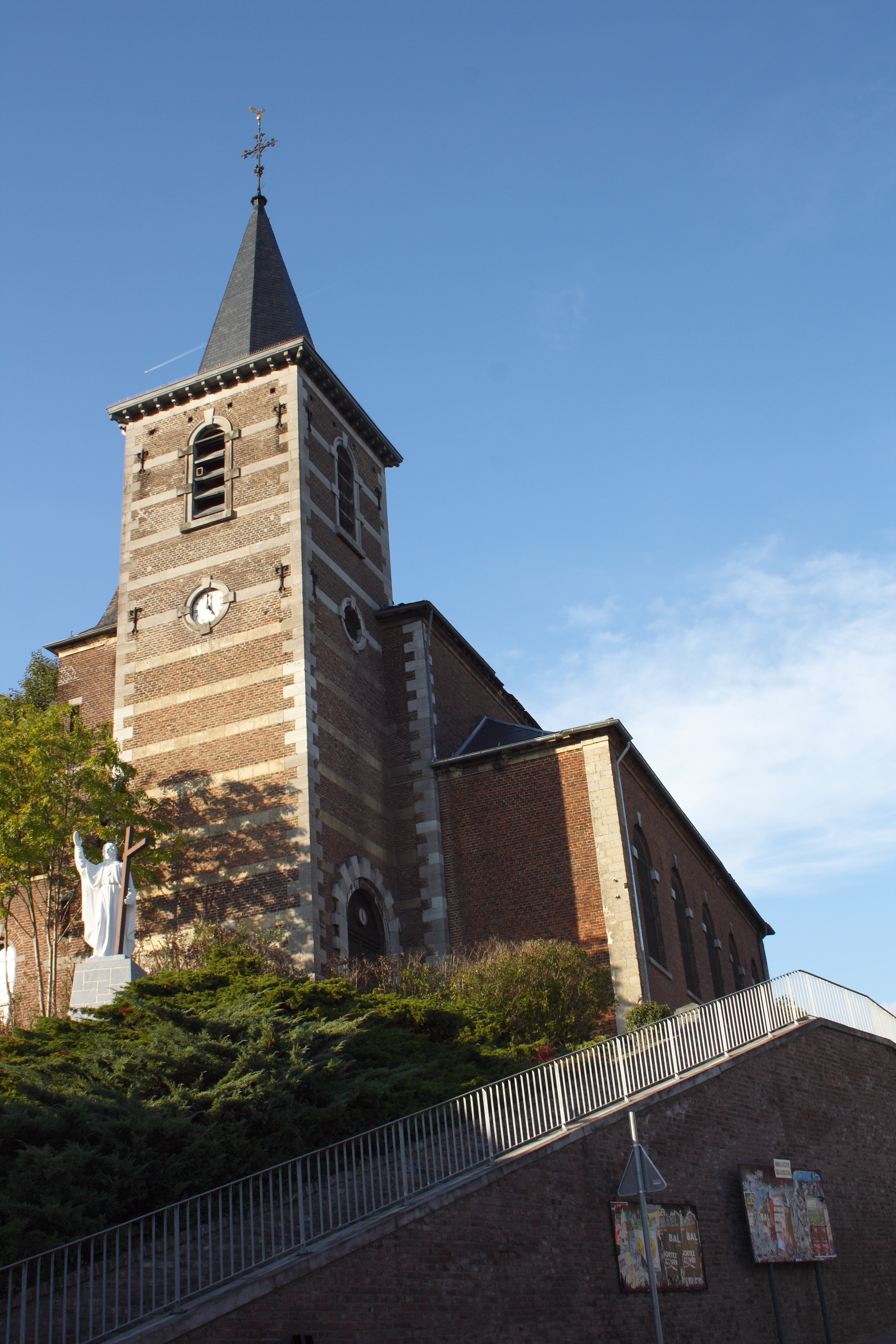 katholische Kirche Saint-Pierre in Bassenge in Belgien